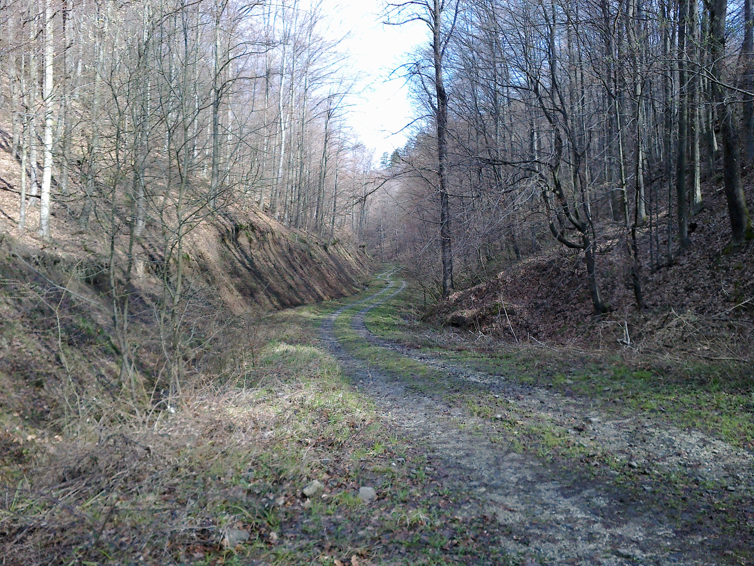 Gradac Našički, Croatia